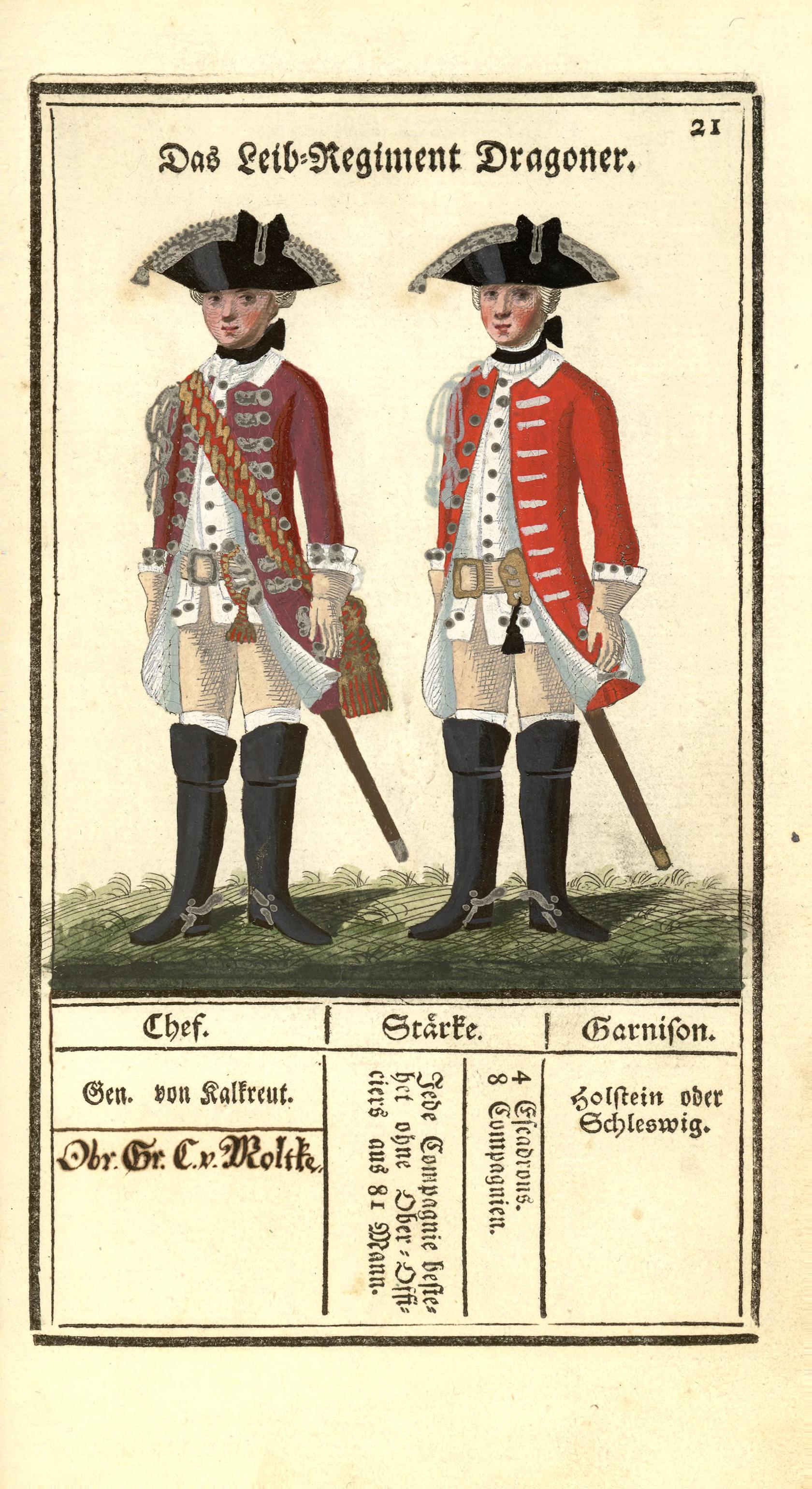 Illustrasjon hentet fra boken "Vorstellung der sämtlichen Königl. Dänischen Armee" av Bertram, Carl og utgitt av Carl Bertram (dk, 1763)